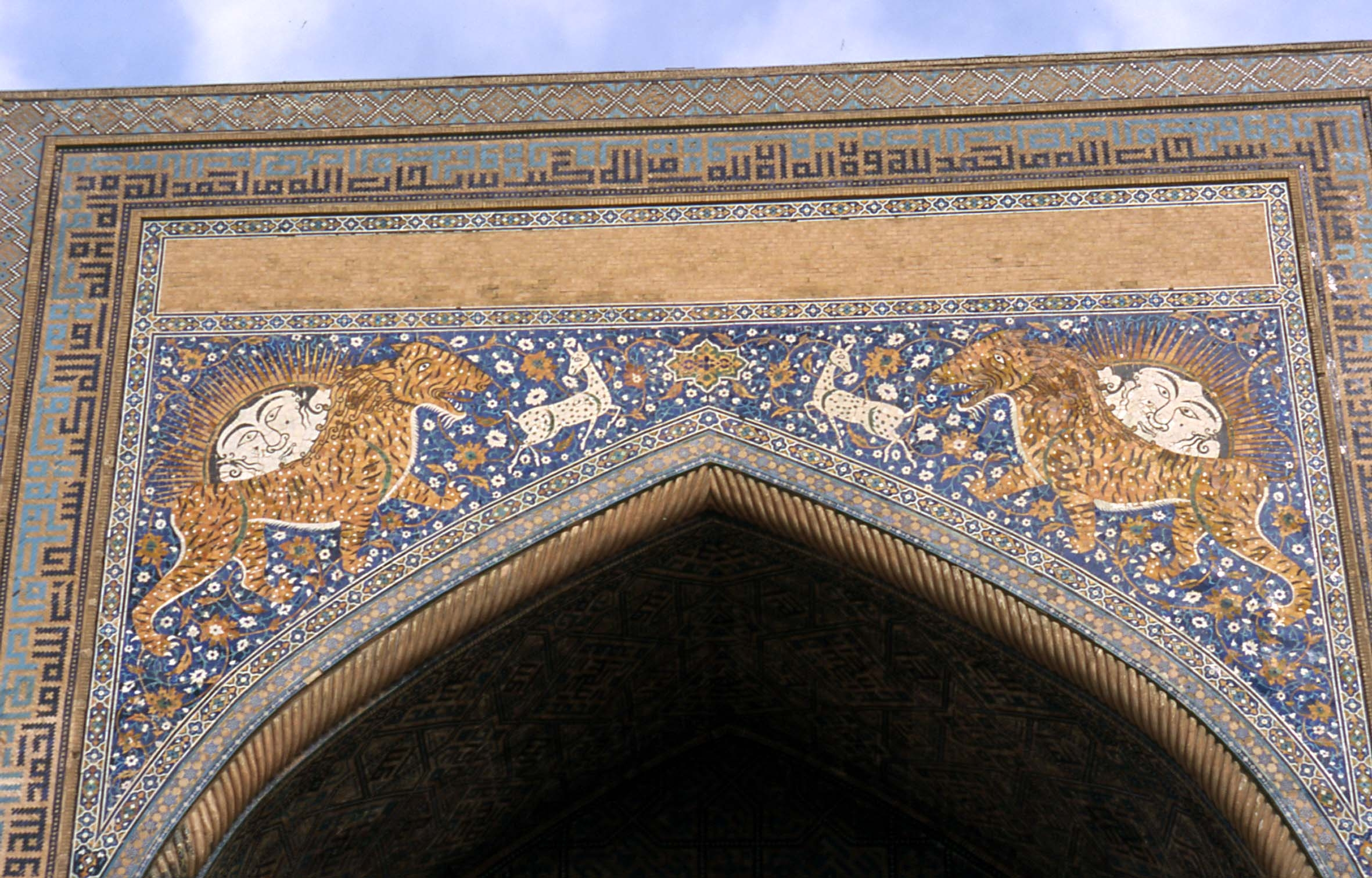 Facciata della madrasa Sherdor nel Registan di Samarcanda